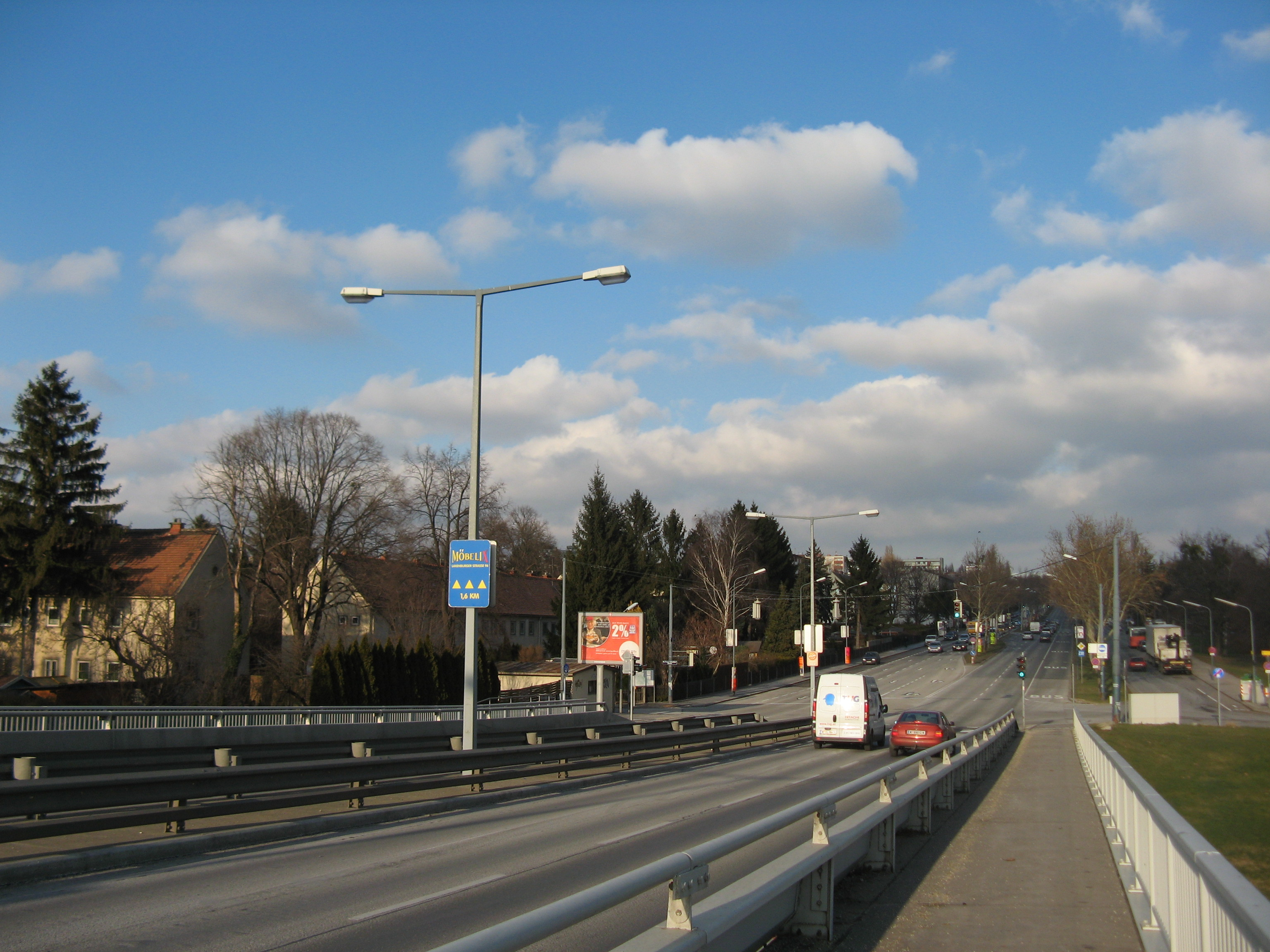 Laxenburger Straße von der Brücke über die Südosttangente aus in Richtung Wienerfeld-Siedlung, Wien-Favoriten